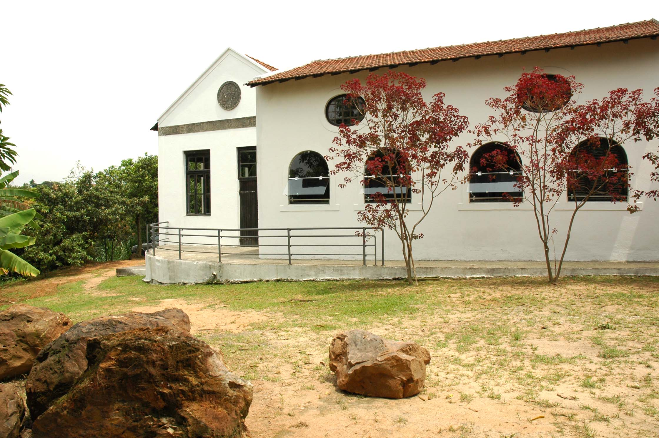 A imagem mostra a lateral esquerda da construção a partir do portão de ferro da entrada.